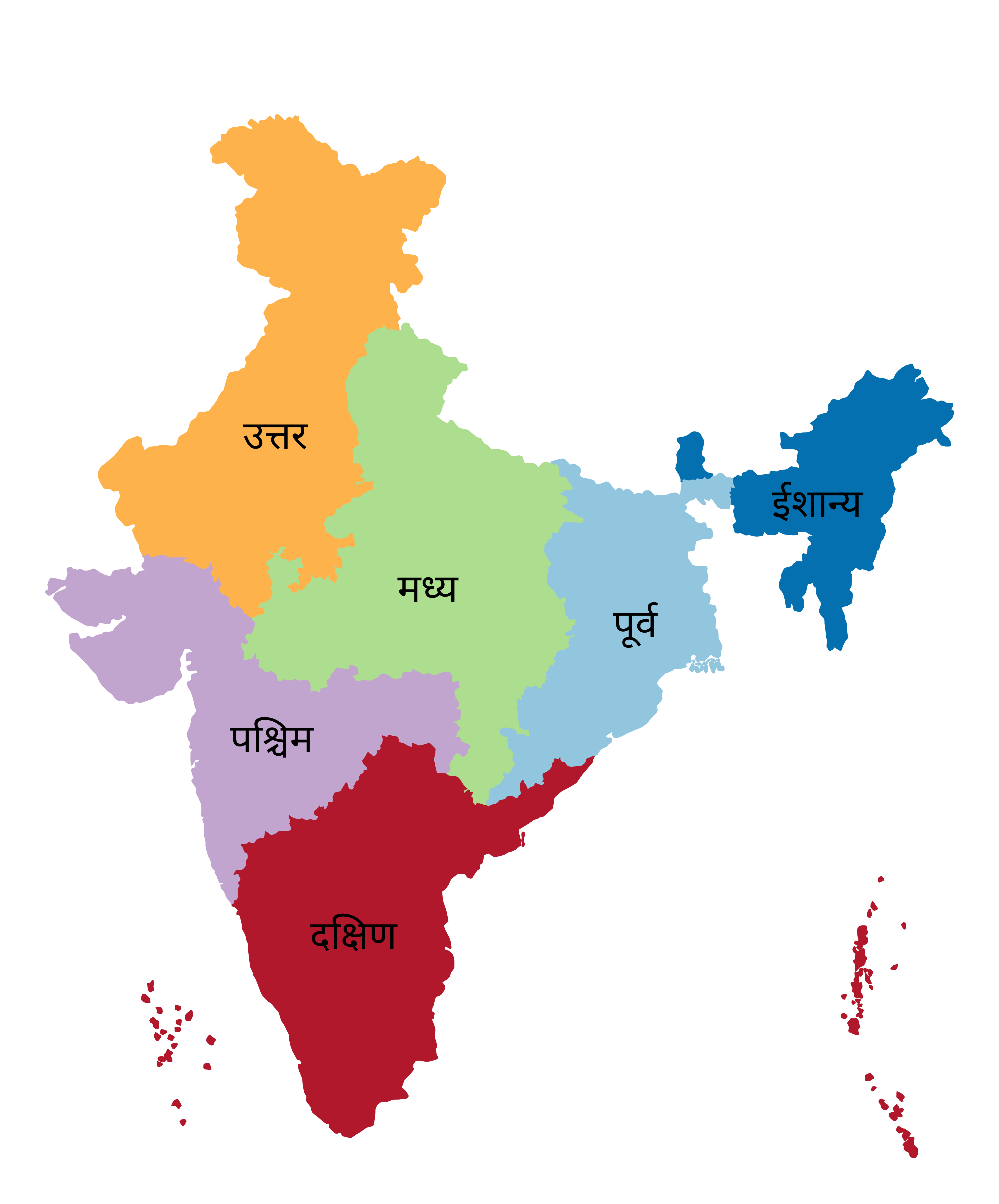 भारतातील विभागीय परिषदांच्या नकाशा